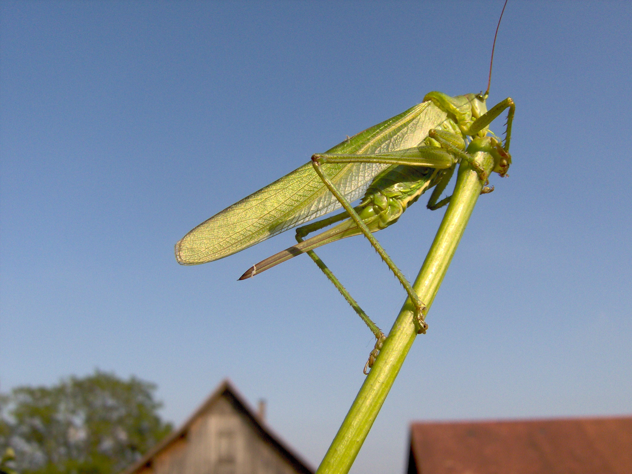 Heupferd an Rebenstaengel schraeg von hinten